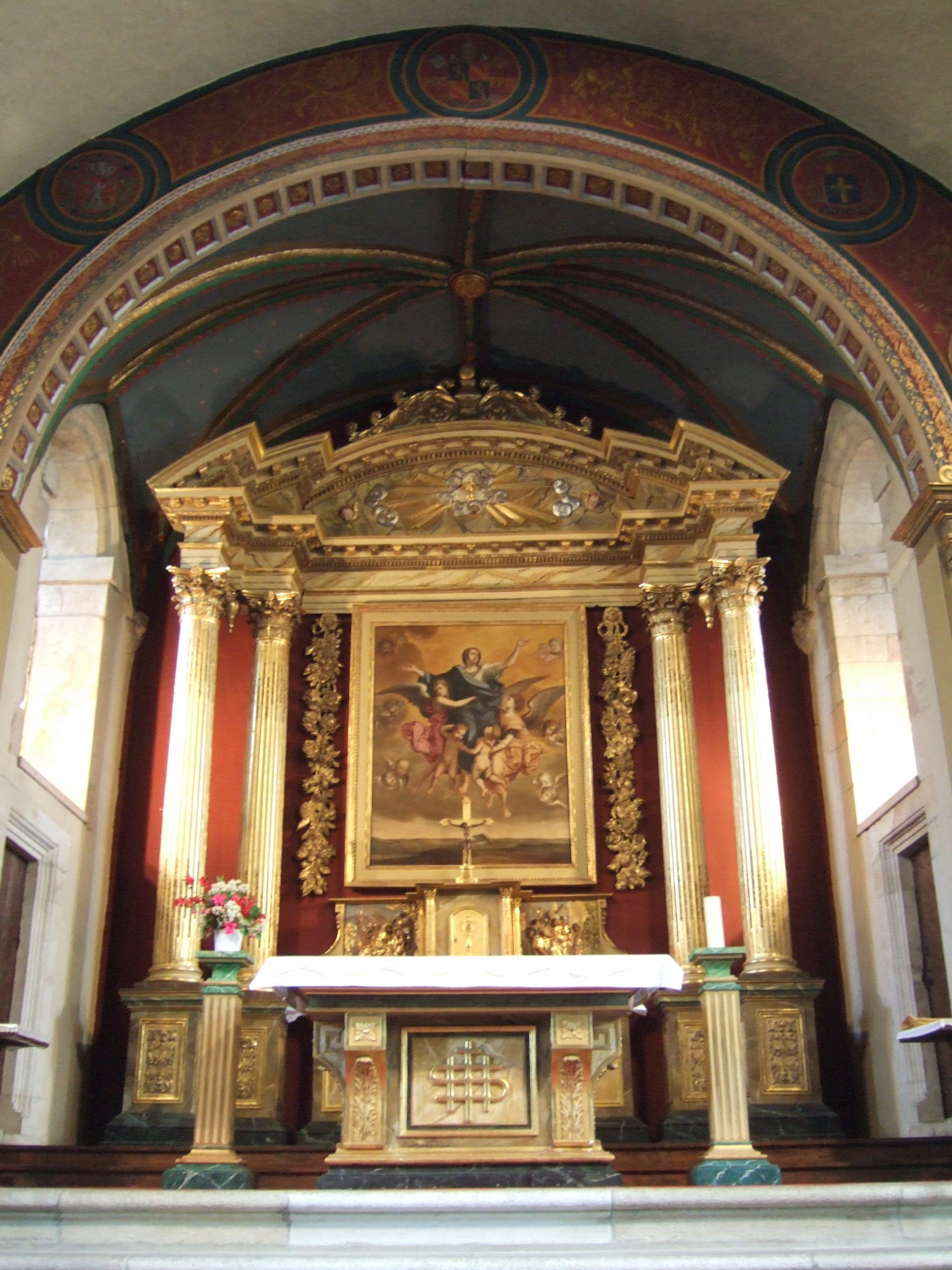 Décor intérieur de l'église Saint-Martin de Sare, dans les Pyrénées-Atlantiques.